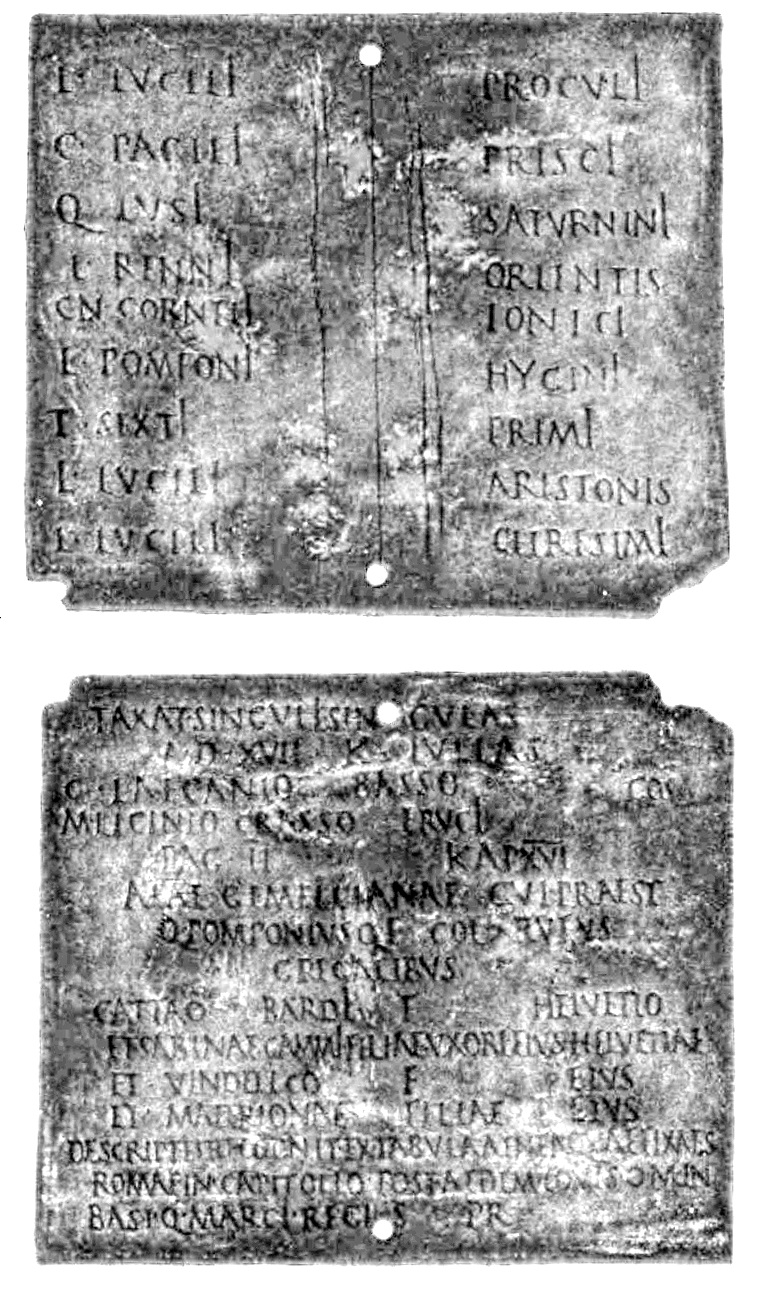 Das Militärdiplom von Geiselprechting wurde 1842 gefunden und regelt die ehrenvolle Entlassung und die Verleihung des römischen Bürgerrechtes an den Legionär Cattus, einem helvetischen Reiter der Auxiliareinheit Ala Gemelliana. Ausgestellt in der Provinz Raetia, gefunden in der Provinz Noricum. Text: [Nero Claudius divi Claudi f(ilius) 3 quorum nomina subscripta sunt 3 dum]/taxat singuli singulas / a(nte) d(iem) XVII K(alendas) Iul(ias) / C(aio) Laecanio Basso / M(arco) Licinio Crasso Frugi co(n)s(ulibus) / pag(ina) II kap(ite) XVI / alae Gemellianae cui prae(e)st / Q(uintus) Pomponius Q(uinti) f(ilius) Col(lina) Rufus / gregalibus / Cattao Bardi f(ilio) Helvetio / et Sabinae Gammi filiae uxori eius Helvetiae / et Vindelico f(ilio) eius / et Materionae filiae eius / descript(um) et recognit(um) ex tabula aenea quae fixa est / Romae in Capitolio post aedem Iovis O(ptimi) M(aximi) in / basi Q(uinti) Marci Regis pr(aetoris) L(uci) Lucili Proculi / C(ai) Pacili Prisci / Q(uinti) Lusi Saturnini / L(uci) Renni Orientis / Cn(aei) Corneli Ionici / L(uci) Pomponi Hygini / T(iti) Sexti Primi / L(uci) Lucili Aristonis / L(uci) Lucili Chresimi Datierung: 15. Juni 64 n. Chr. Fundort: Geiselprechting, Gemeinde Vachendorf, Lkr. Traunstein Verwahrort: Das Original befindet sich in der Archäologischen Staatssammlung München, Inventarnummer: HV 815